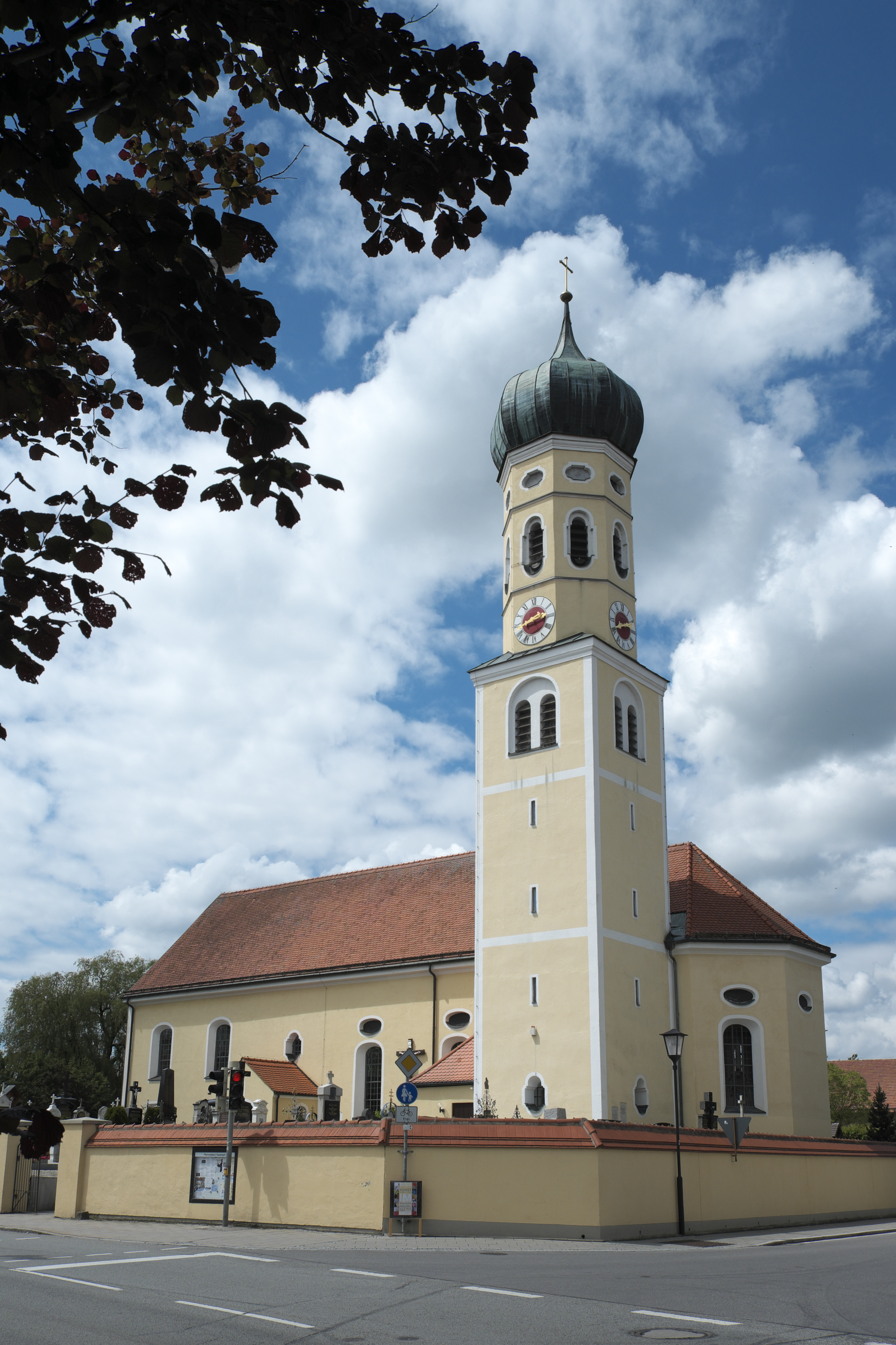 Katholische Kirche Sankt Andreas in Sauerlach im Landkreis München (Bayern/Deutschland)